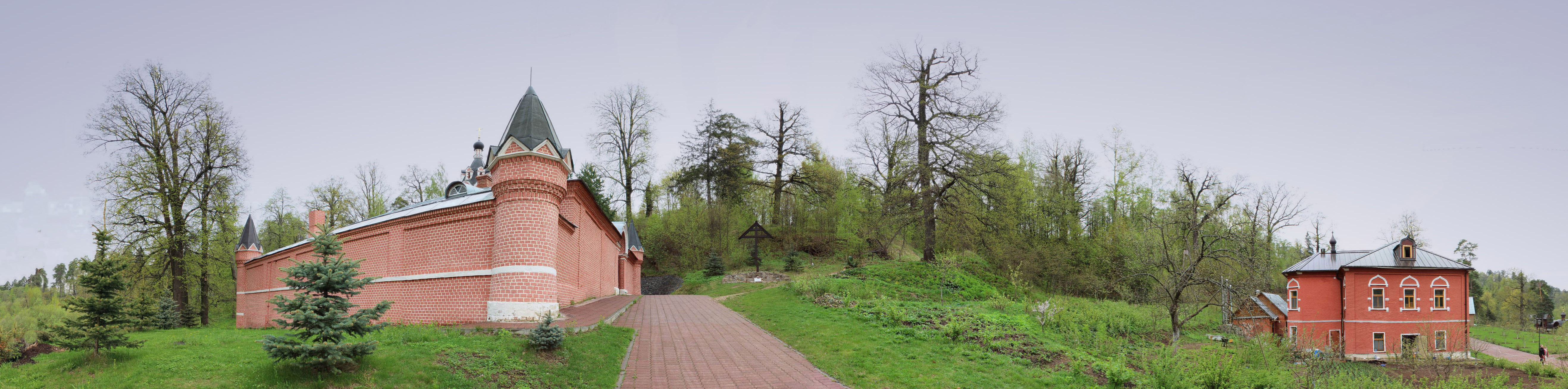 Skete of the Savvino-Storozhevsky Monastery